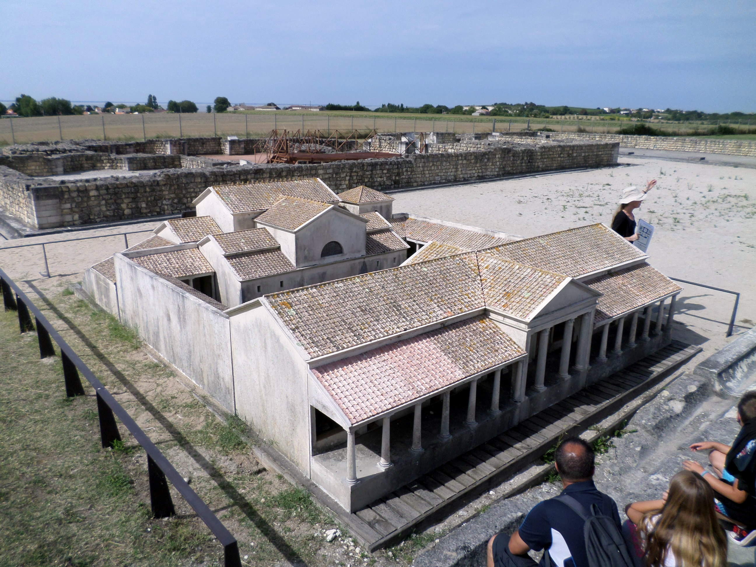 maquette des thermes romaines au Fa, à Barzan (17), France